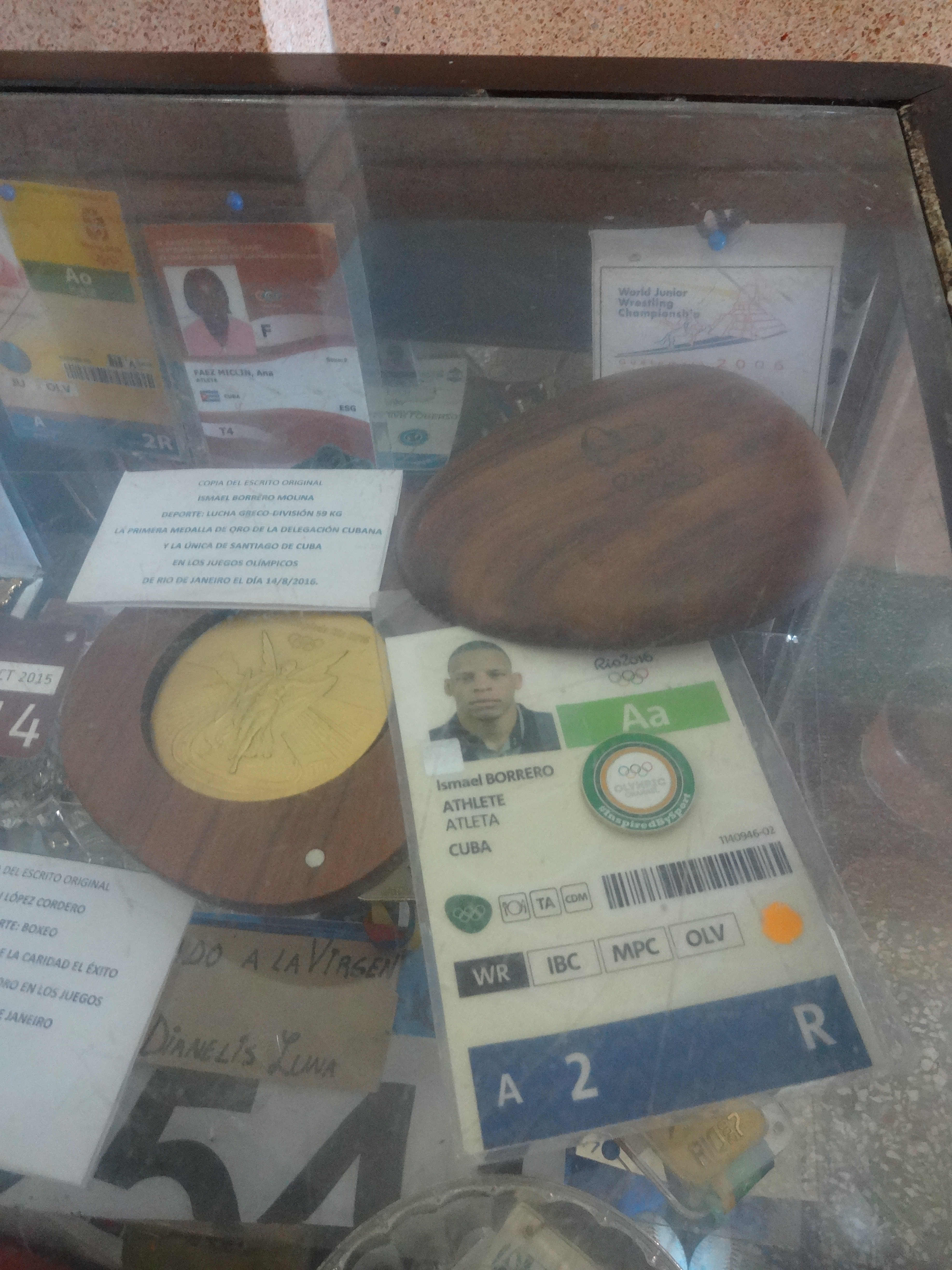 Goldmedaille von Ismael Borrero Molina Kirche von El Cobre in der Nähe von Santiago de Cuba